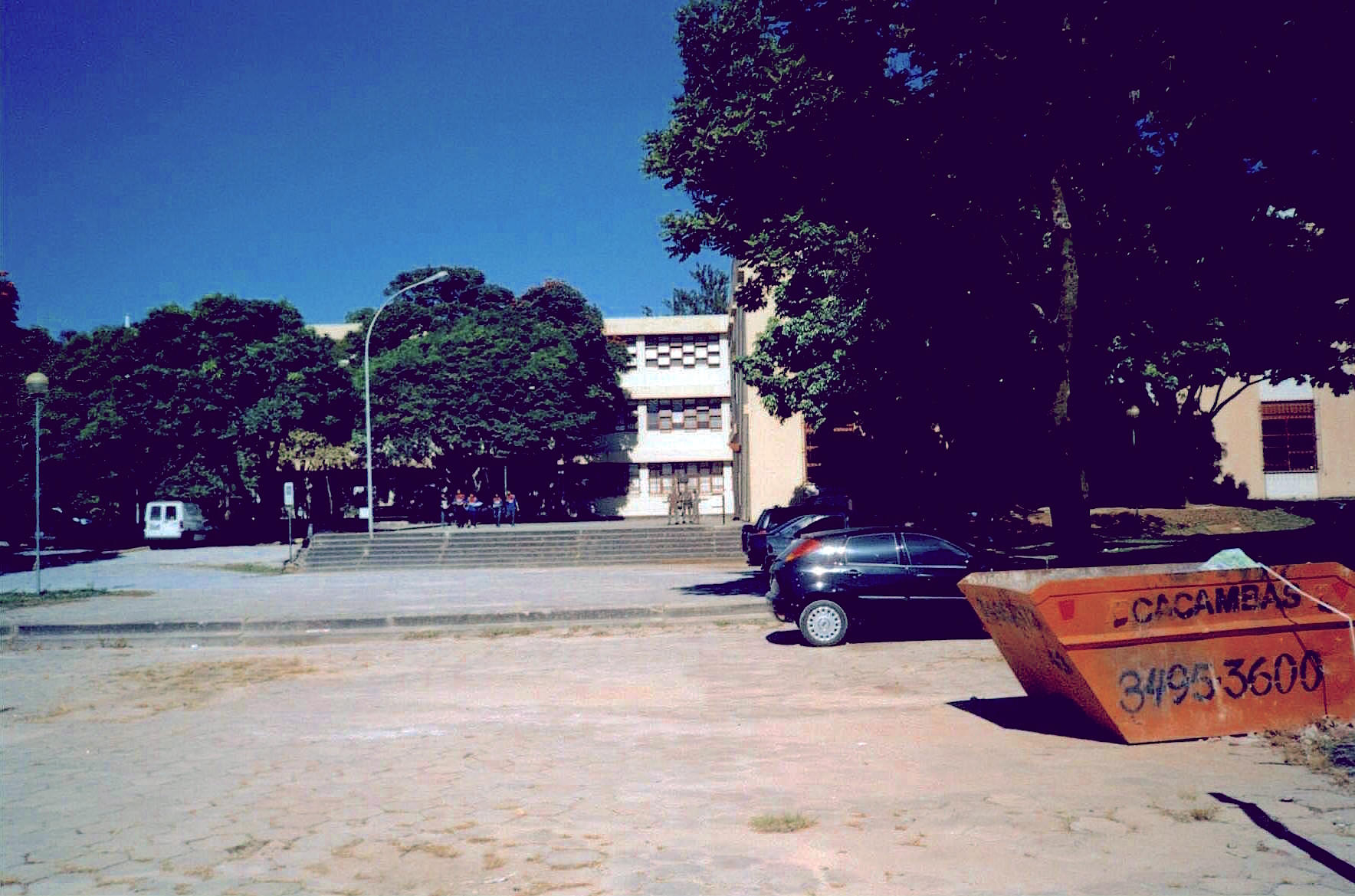 Vista do Colégio Técnico da UFMG em 2006.